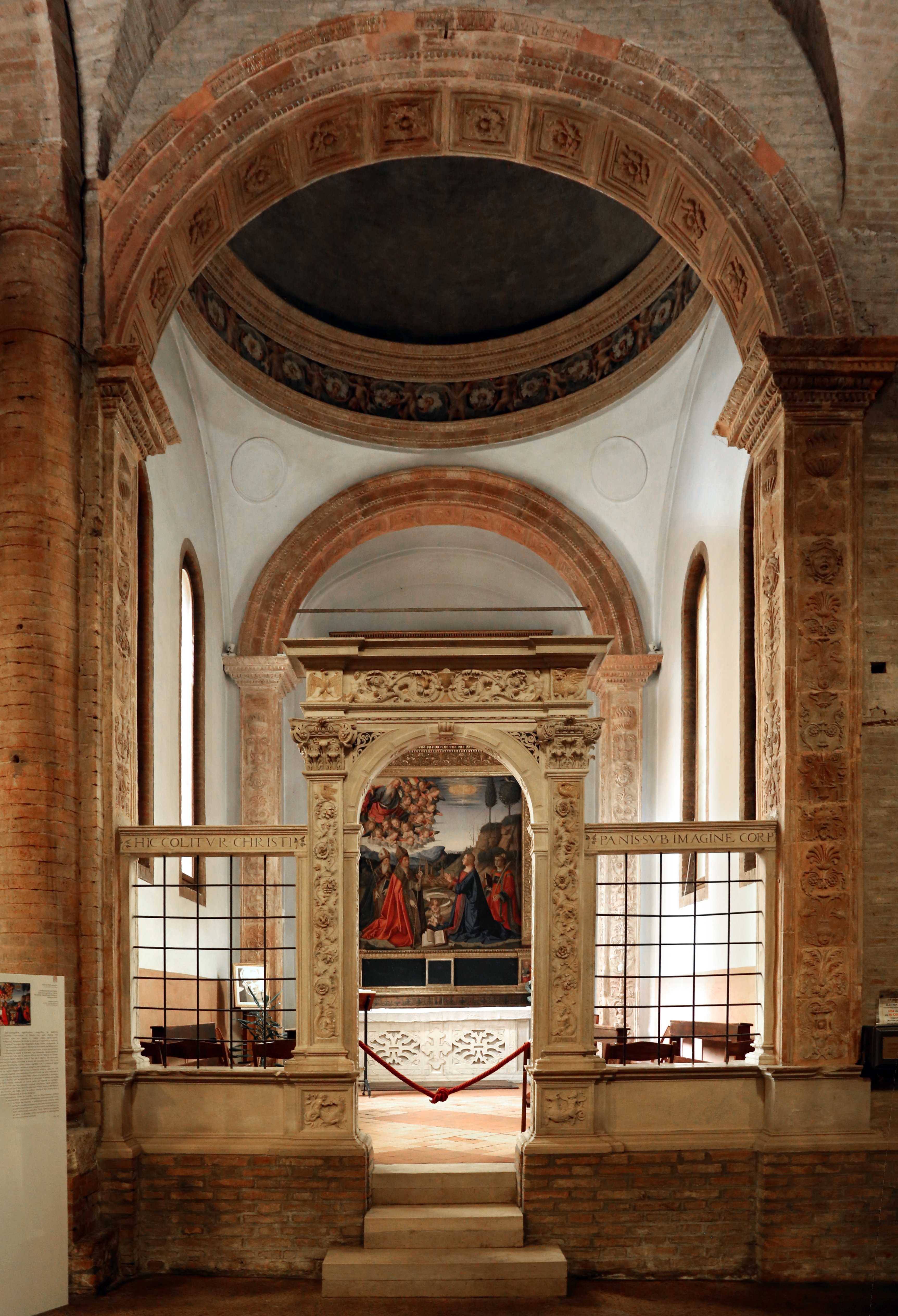 abbazia di San Mercuriale This is a photo of a monument which is part of cultural heritage of Italy.